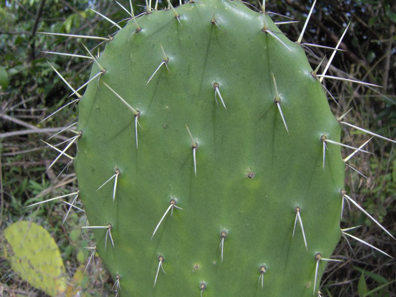 Cladodio de tuna silvestre de los andes venezolanos, específicamente en la localidad de La Becerrera en Santa Ana de Trujillo, Venezuela. No se tiene información del nombre científico, nombre vulgar "tuna".